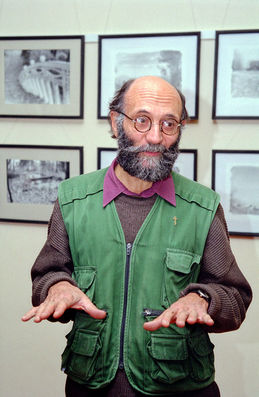 Георгий Мстиславович Колосов, русский фотограф-пикториалист, выступает на выставке Людмилы Таболиной в заводоуправлении ОАО «Компания Славич».